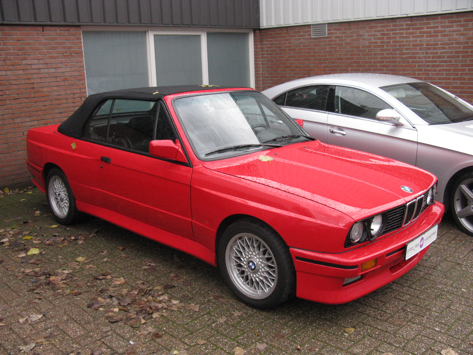 BMW M3 Cabriolet E30